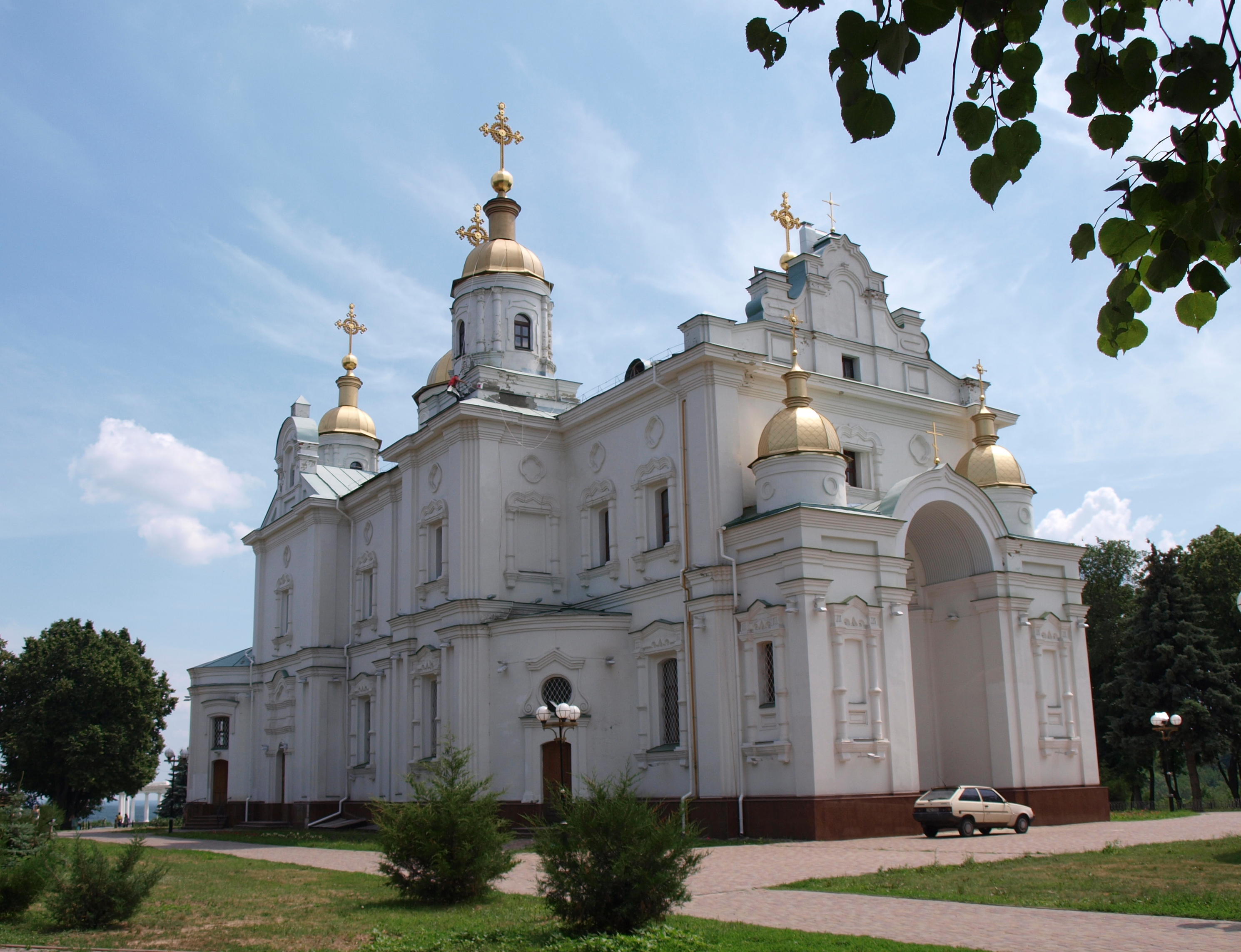 Свято-Успенский собор в Полтаве